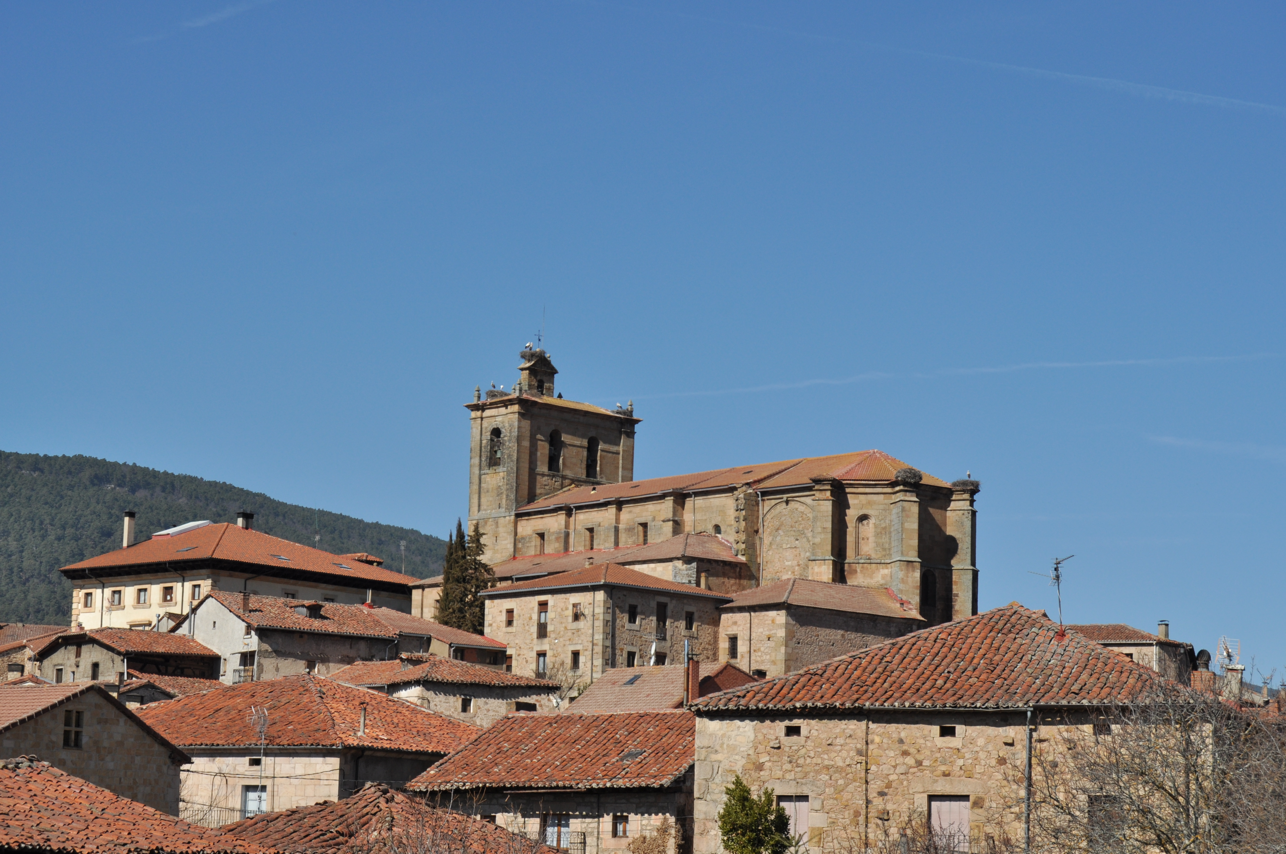 Vinuesa - 020